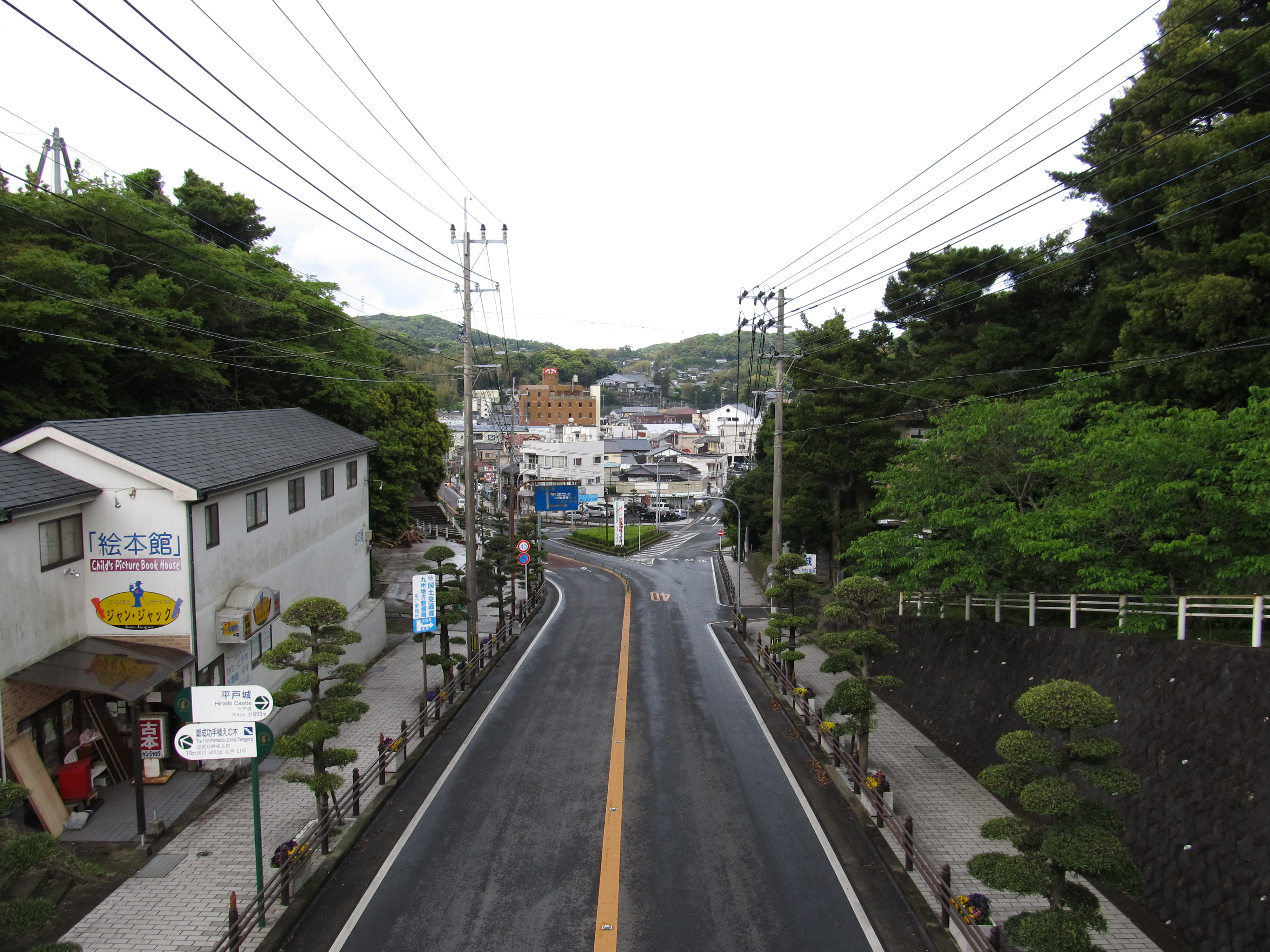 長崎県平戸市の亀岡神社（平戸城跡）前を通る国道383号。画像奥のデルタ部分はすべて国道だが、この先は橙線の入っていない右側の道が国道である。